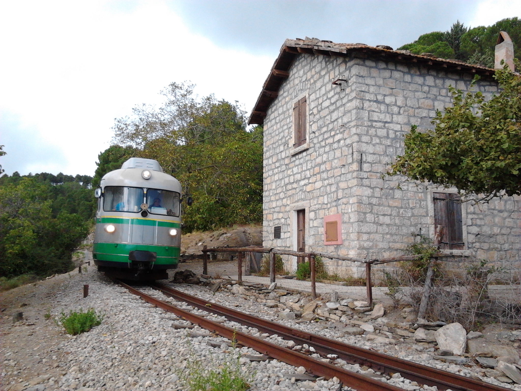 Andrea Mura, settembre 2012, Stazione di Anulù della Ferrovia Mandas-Arbatax